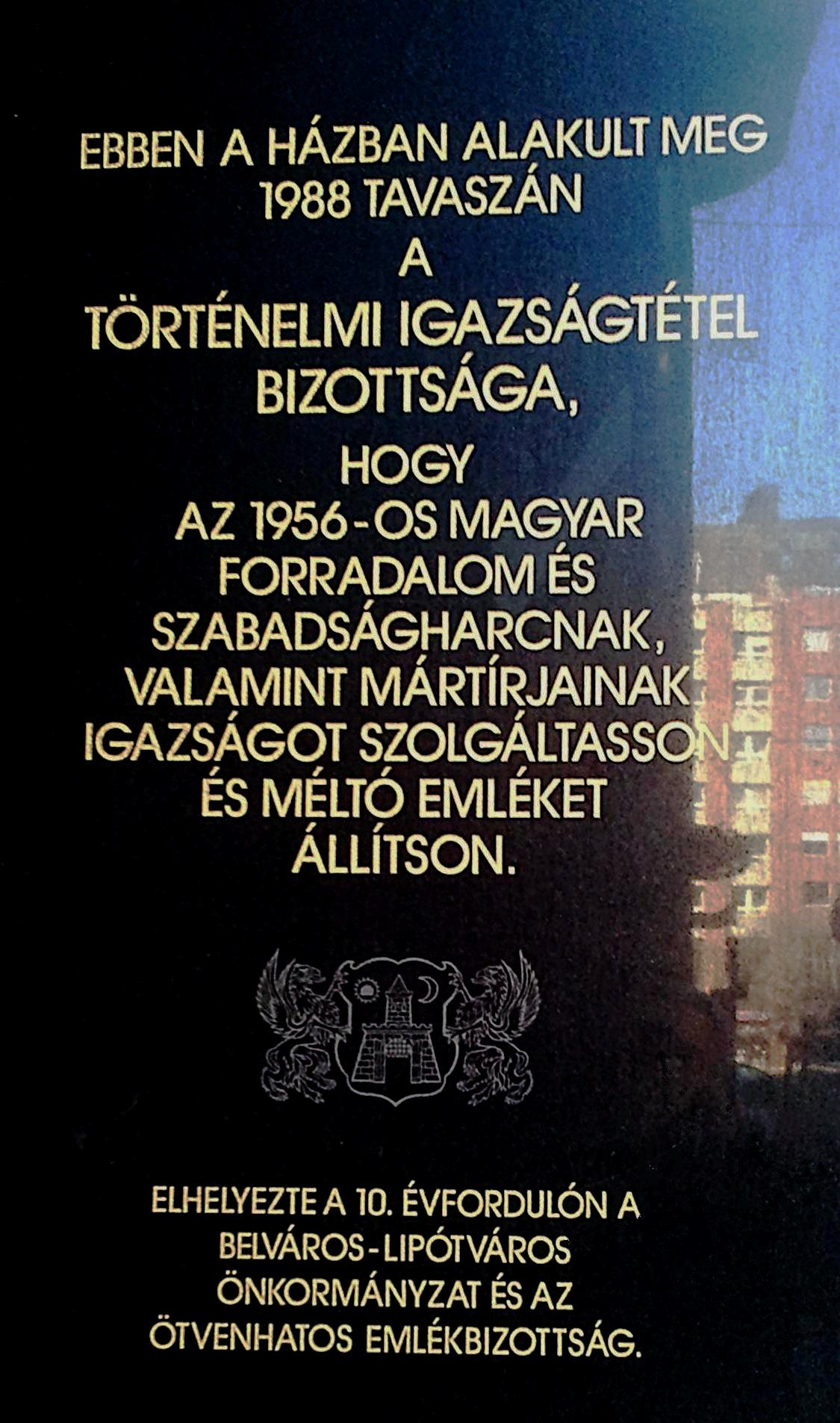 A Történelmi Igazságtétel Bizottság emléktáblája